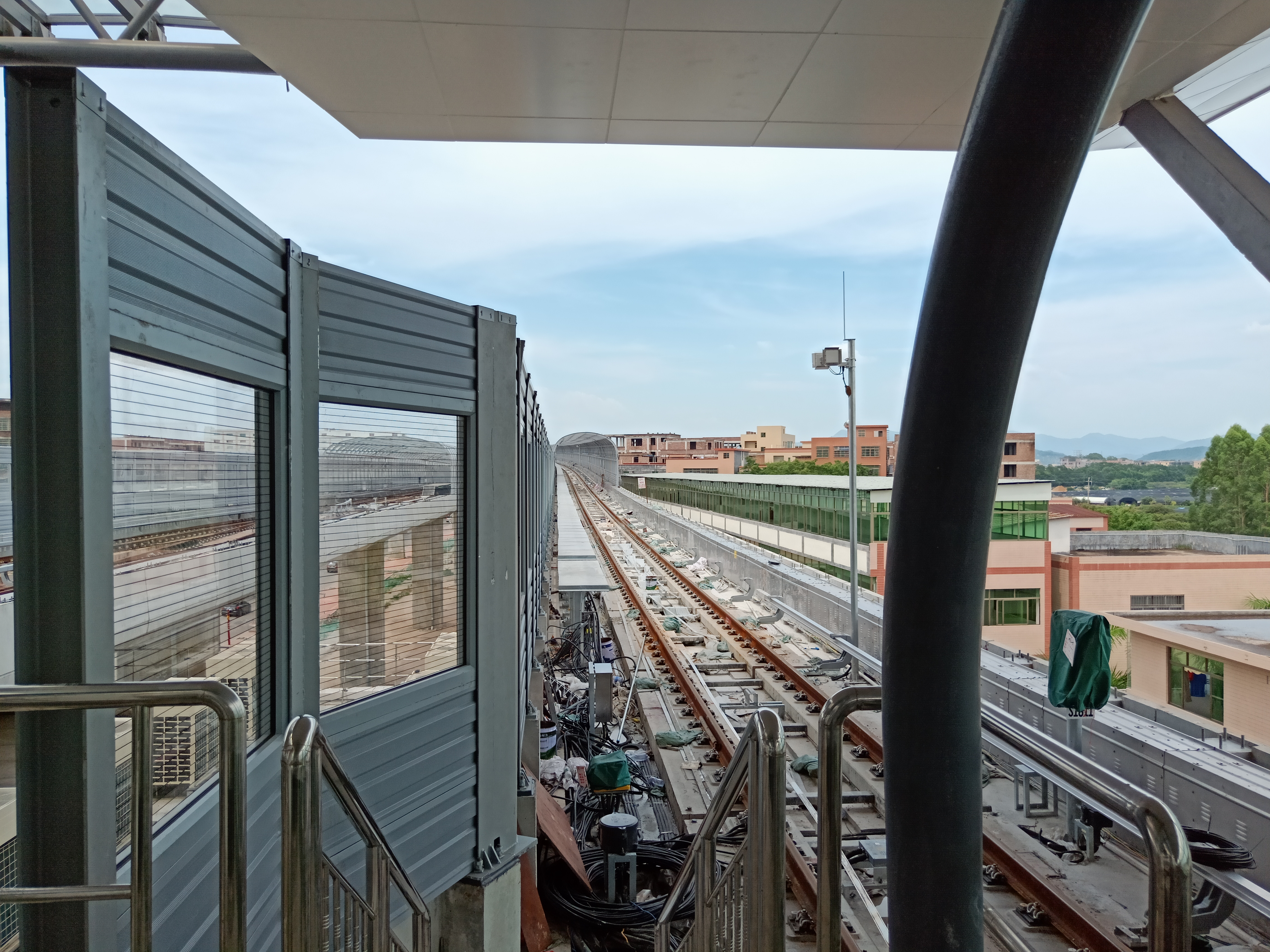 粵語: 2018年7月16號，廣州地鐵新和站嘅主綫重喺度鋪緊軌。